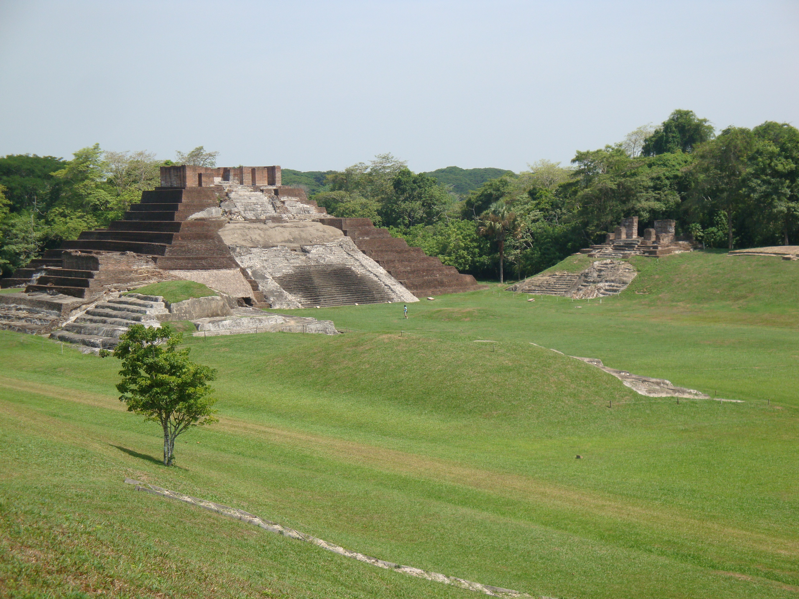 Templo I, zona arqueológica maya de Comalcalco, Tabasco, México.